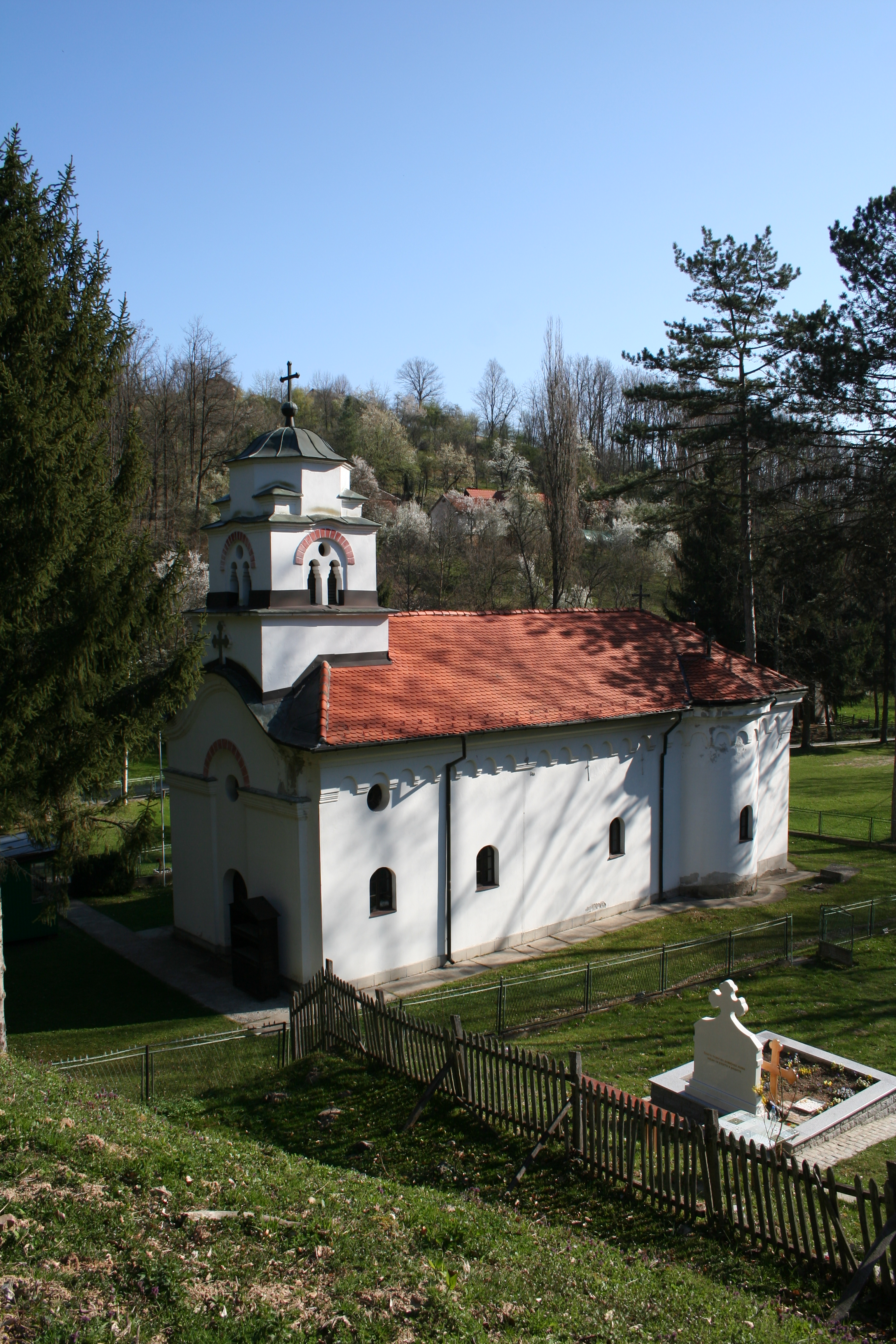 Crkva Prenosa moštiju Sv. Nikolaja, Pričević